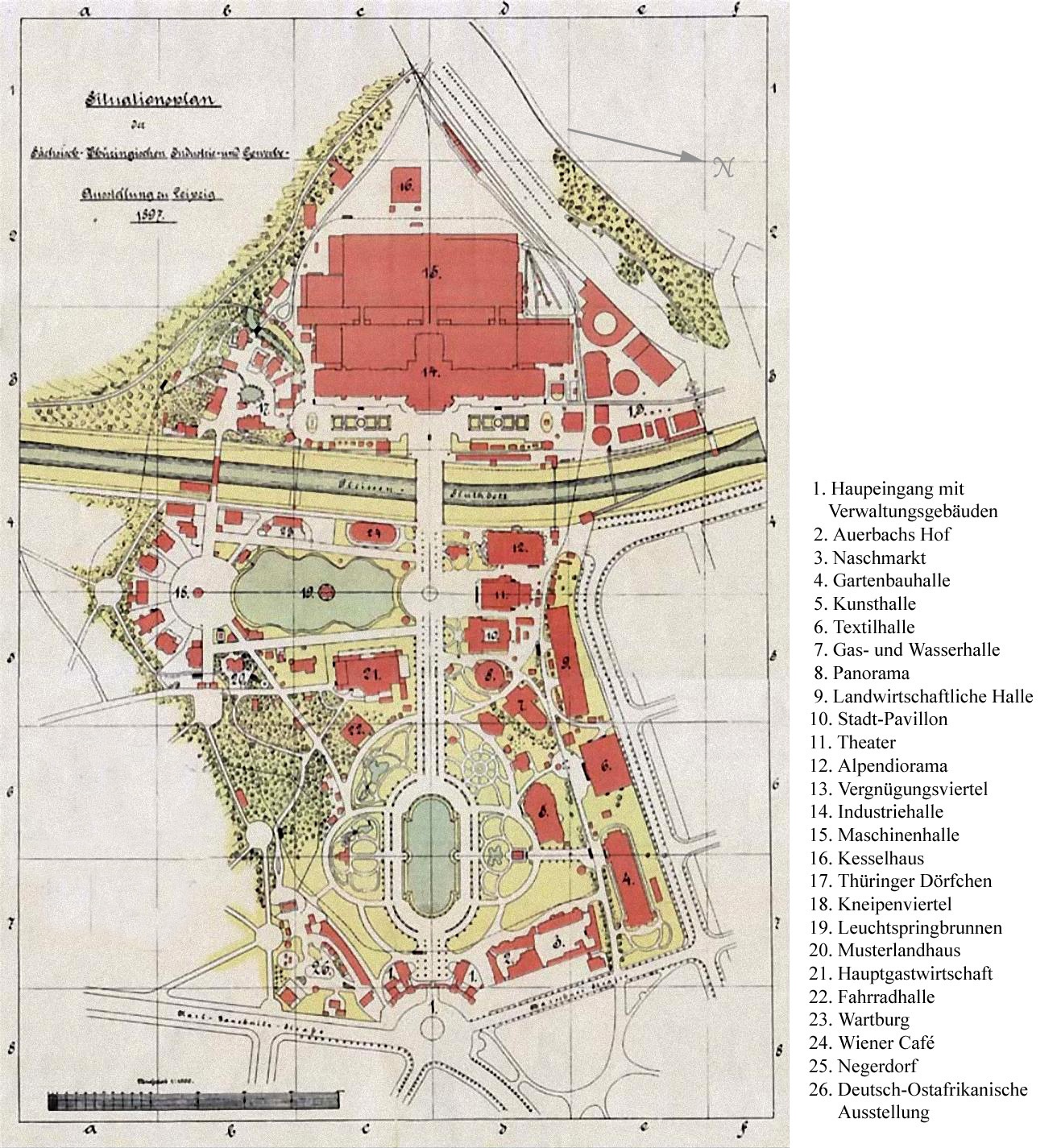 Lageplan der Sächsisch-Thüringischen Industrie- und Gewerbeausstellung Leipzig 1897